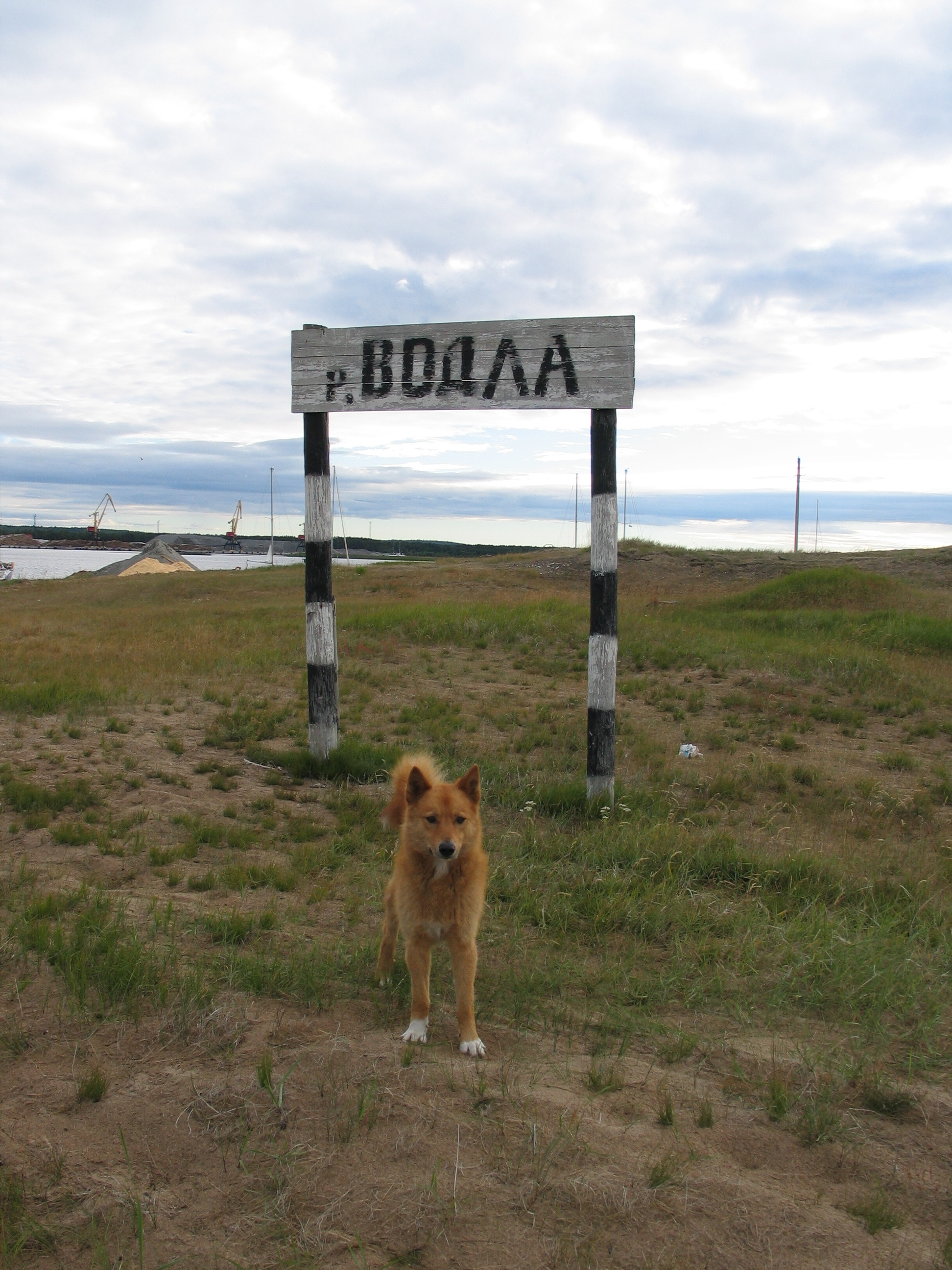 Щит с названием р. Водла в устье реки